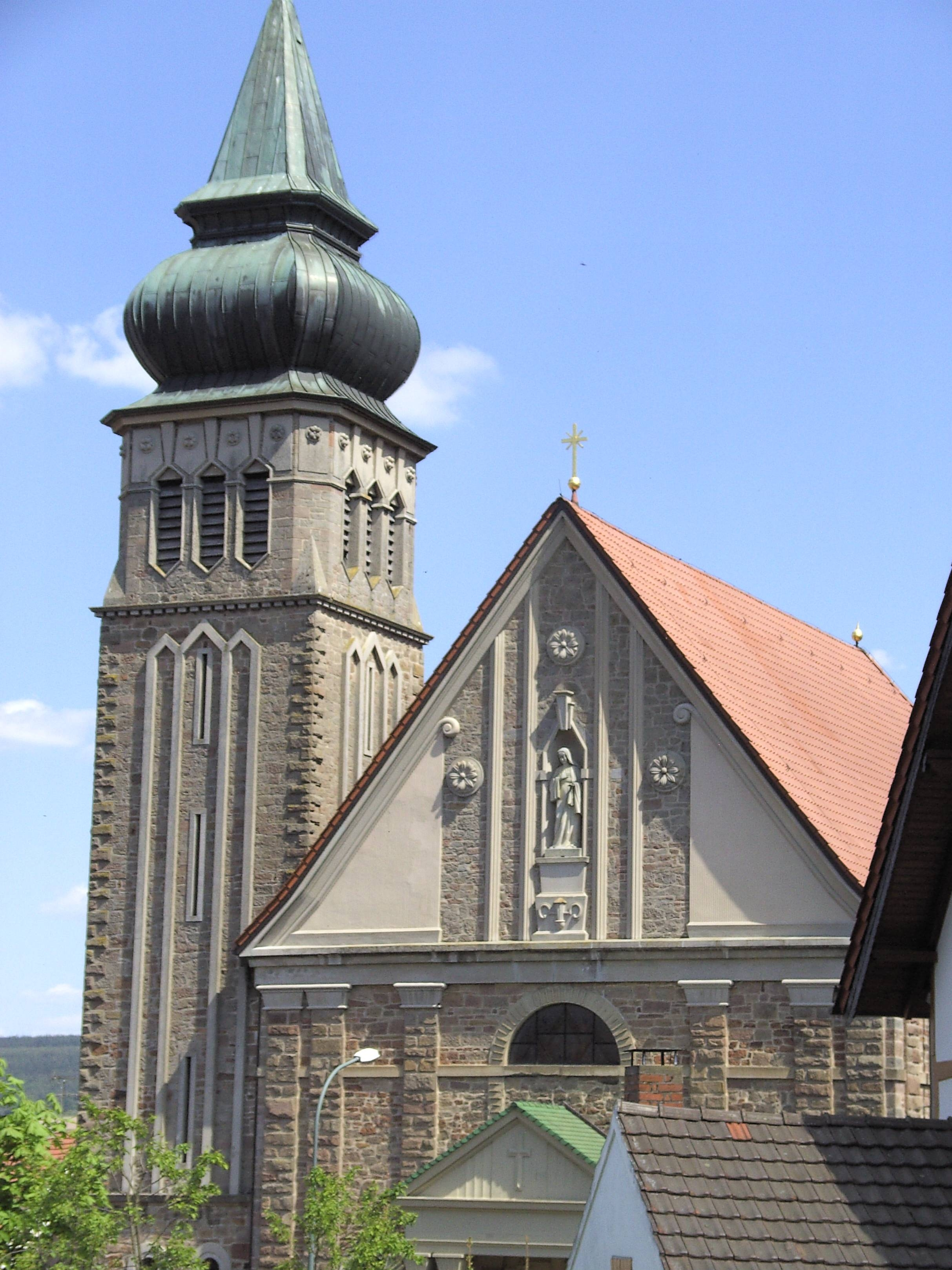 Die kath. Pfarrkirche in Hainzell